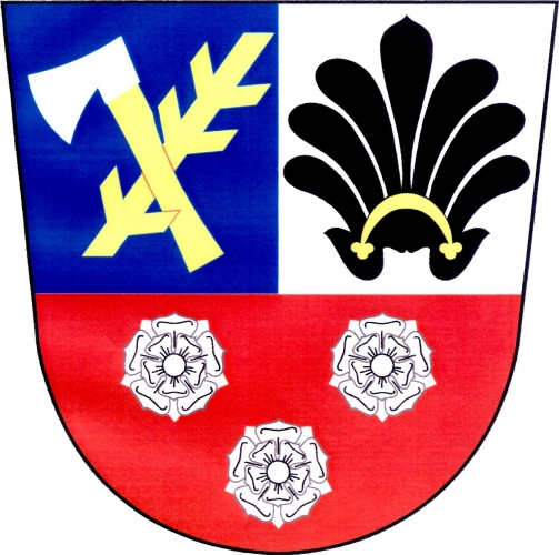 znak,Starý Petřín , okres Znojmo